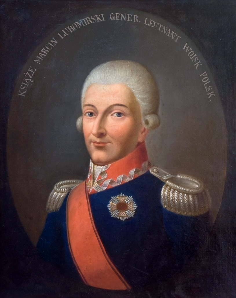 Jerzy Marcin Lubomirski źródło